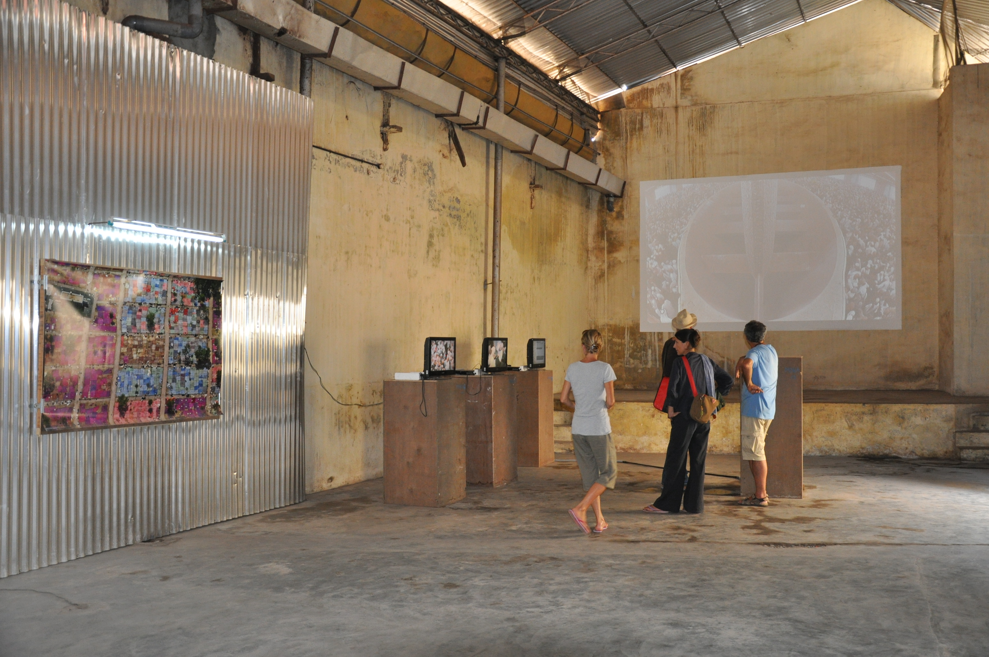 കൊച്ചി മുസിരിസ് ബിനാലെ 2012 ൽ അഹ്‌മദ് മാത്തറടെ ഡെസേർട്ട് ഓഫ് ഫറാൻ/ആദം എന്ന വീഡിയോ - ഫോട്ടോഗ്രാഫുകളുടെ ഇൻസ്റ്റളേഷൻ ആസ്വദിക്കുന്നവർ